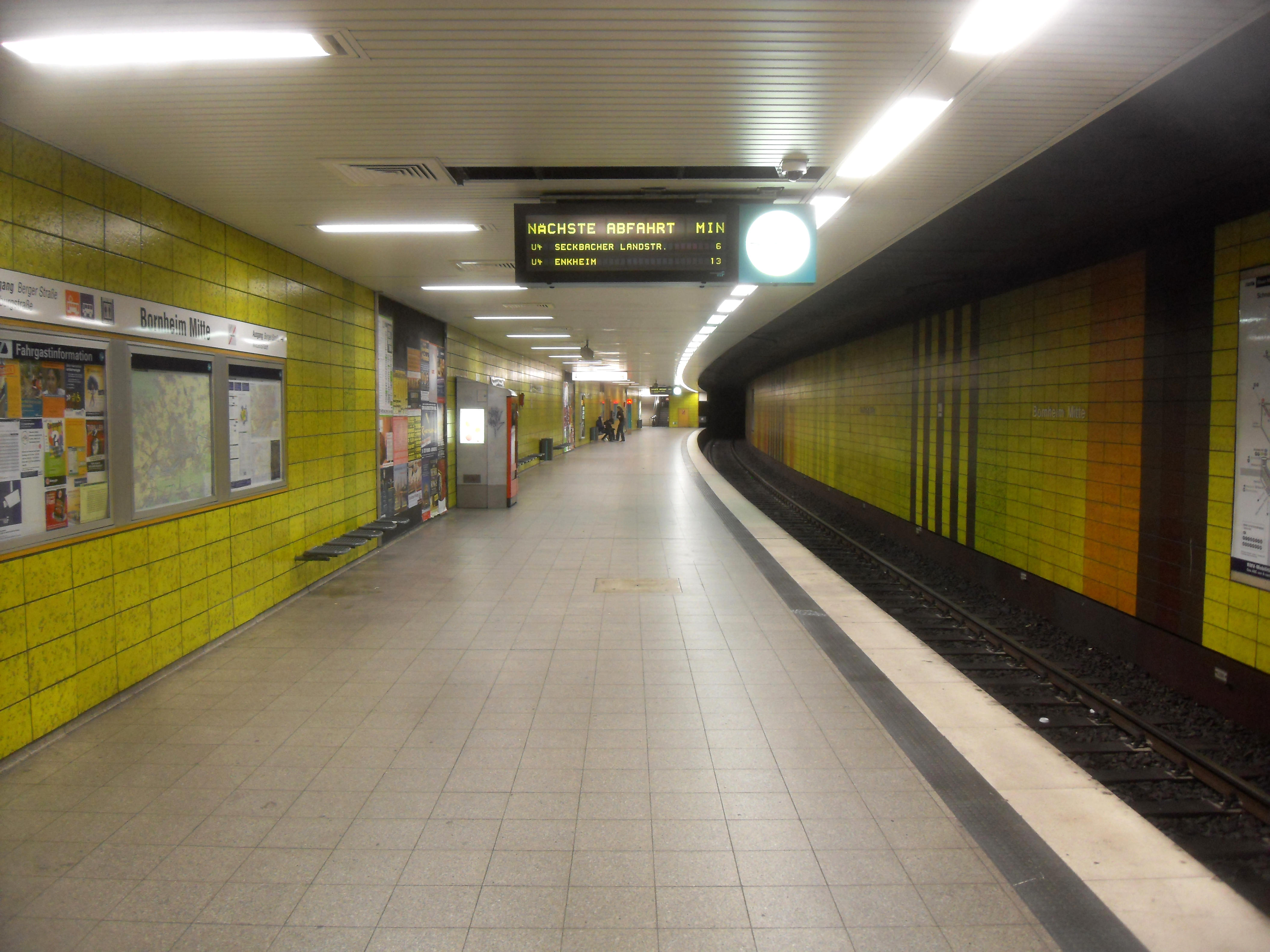 Bahnsteig der C-Ebene (Richtung Seckbacher Landstraße) des U-Bahnhofes Bornheim Mitte auf der Linie U 4 der U-Bahn Frankfurt in Hessen (Deutschland)